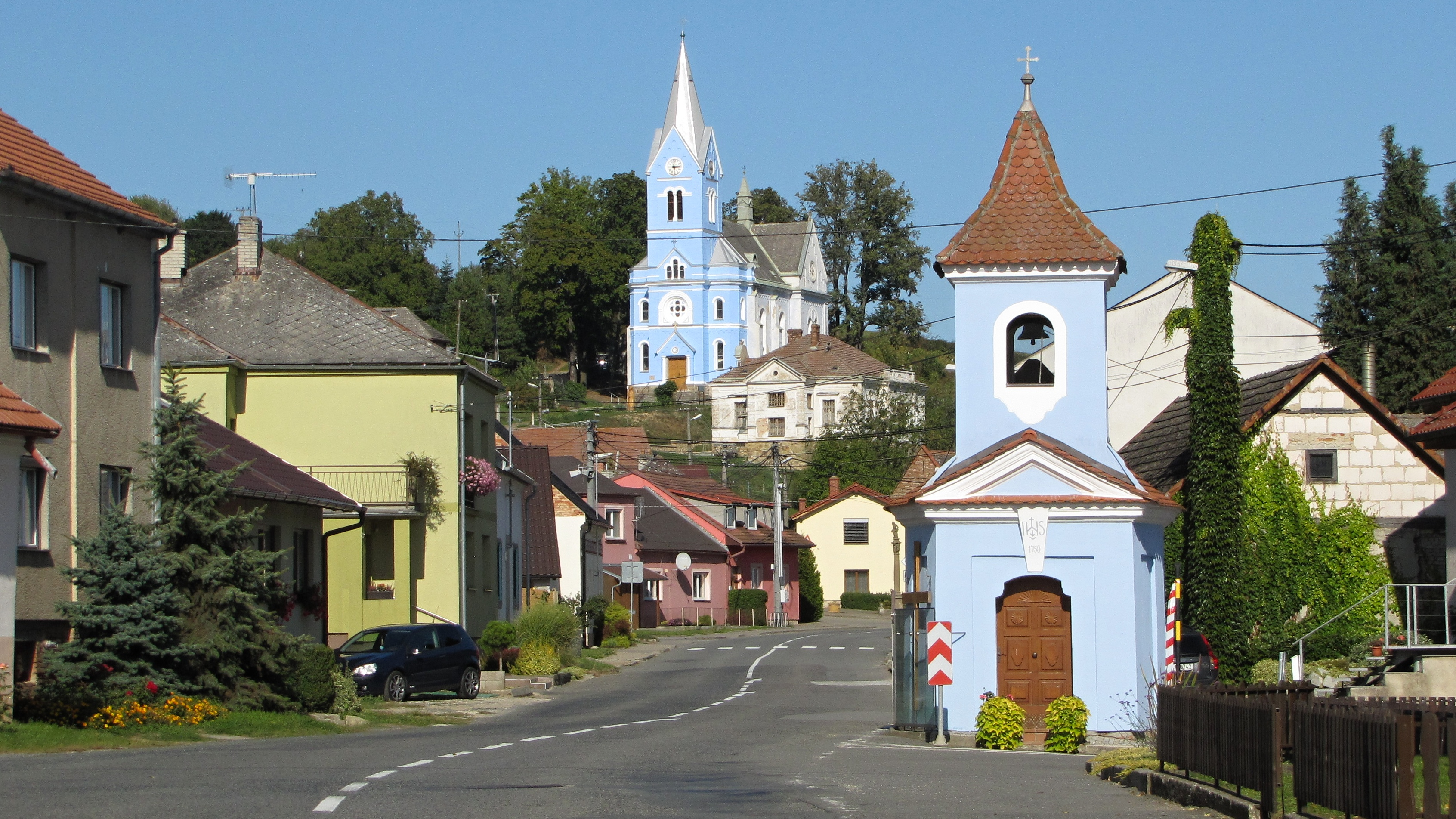 Kaple svatého Prokopa a kostel svatého Prokopa ve Stříbrnicích